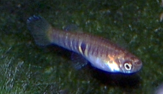 Neoheterandria elegans, Weibchen